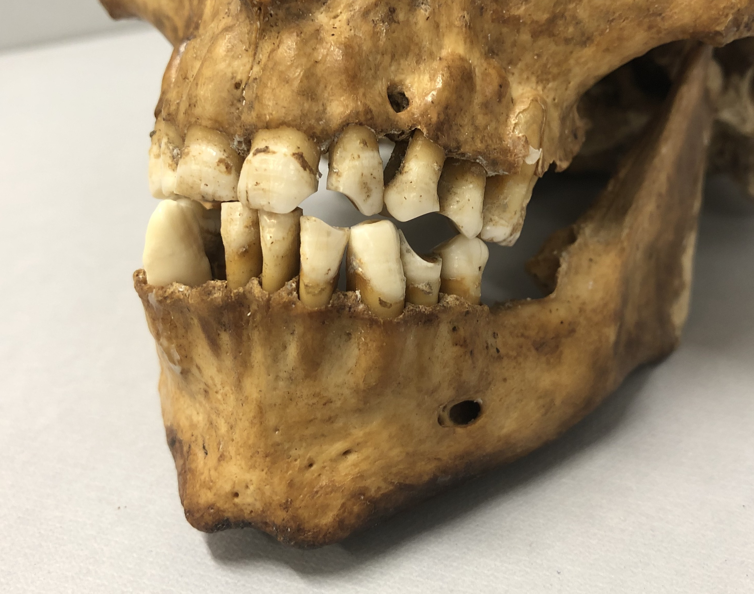 Theo der Pfeifenraucher, Gebissl, Naturhistorisches Museum Basel